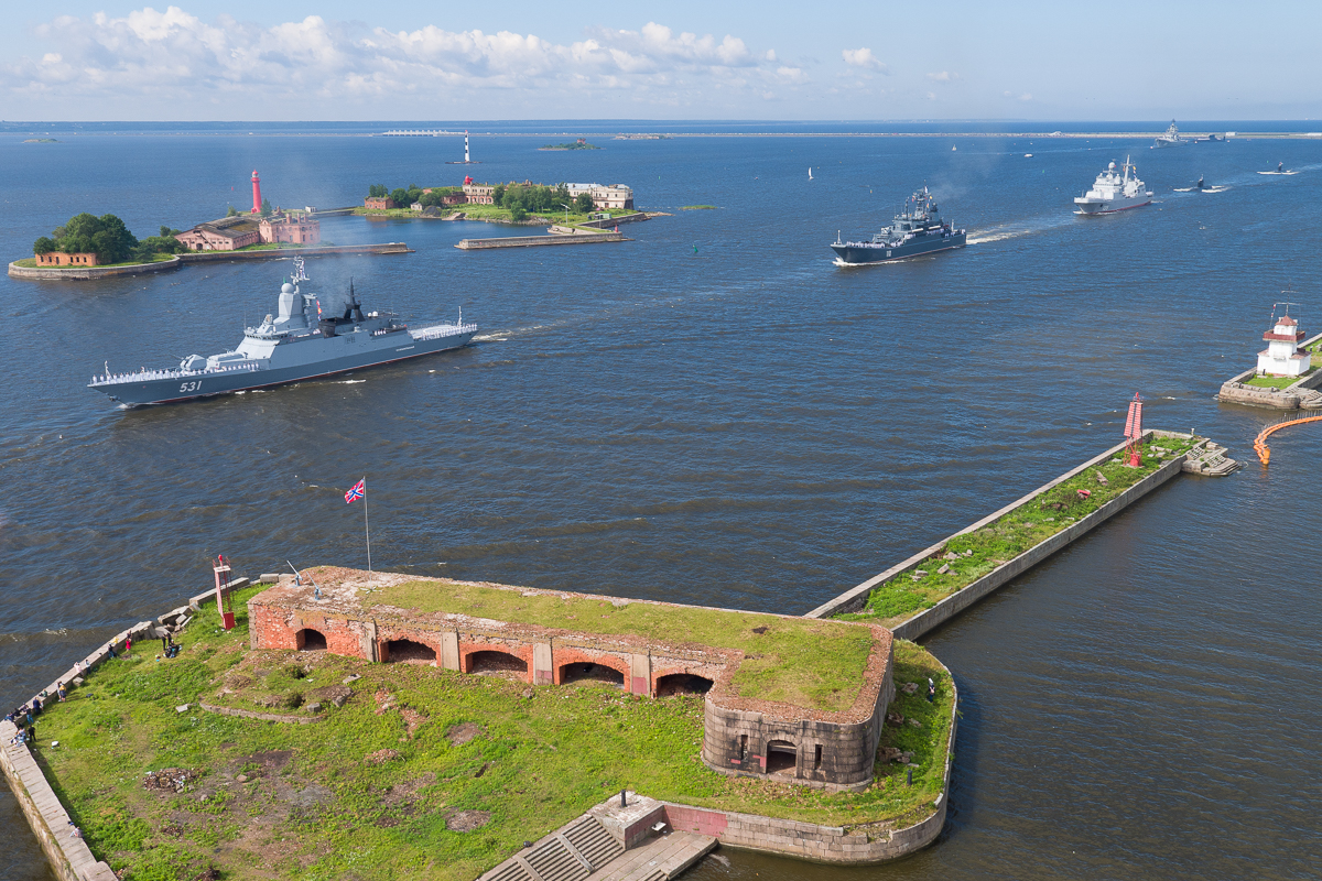 Главный военно-морской парад в Кронштадте